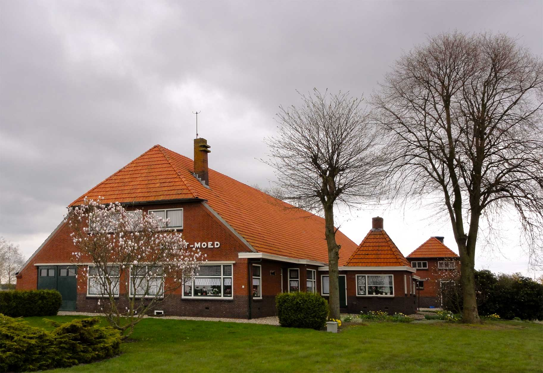 Boerderij Barkelazwet 6 te Alteveer